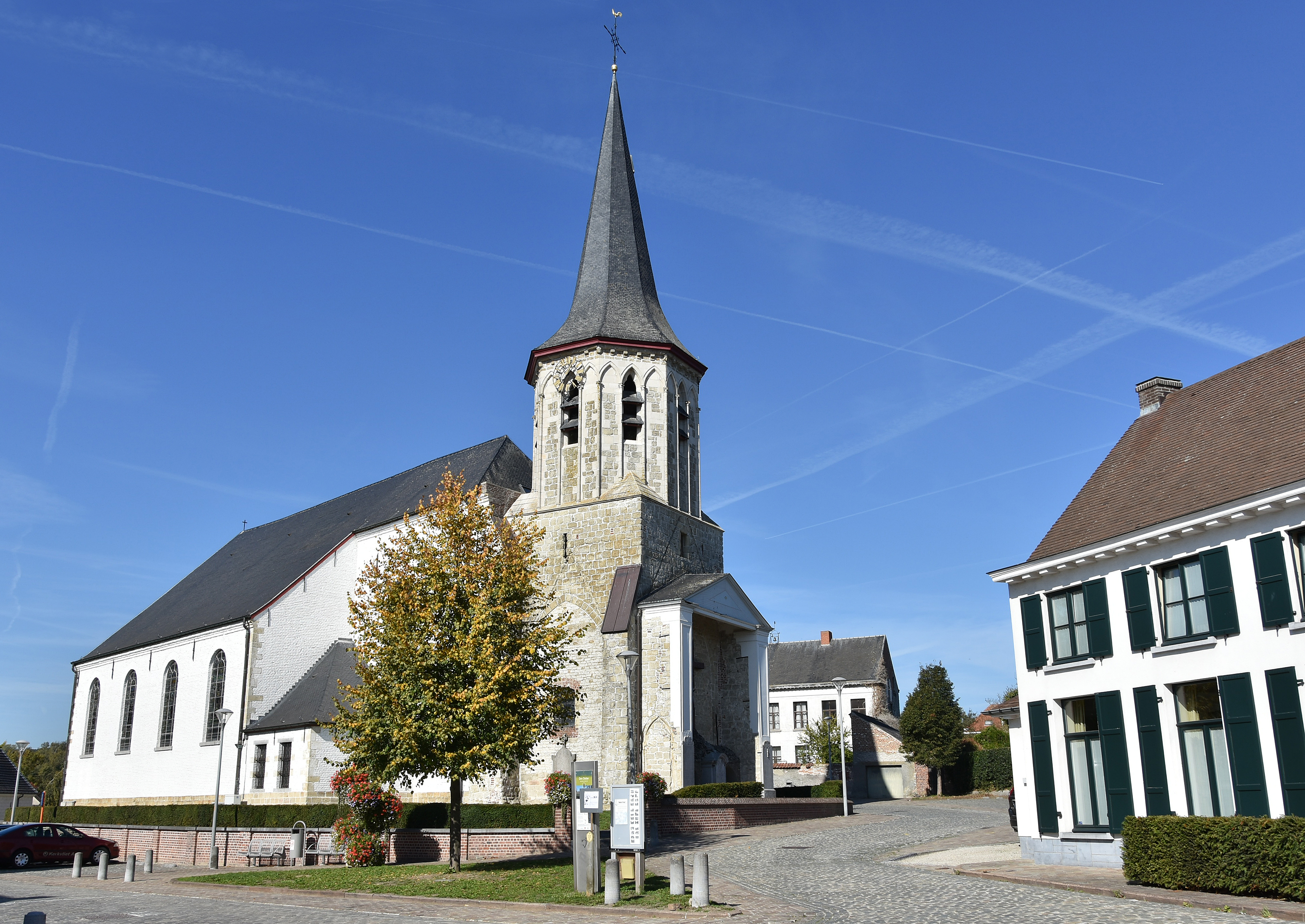 Parochiekerk Sint-Niklaas en Leonardus Aaigem (8251) 5-10-2018 This photo of immovable heritage has been taken in the Flemish Region